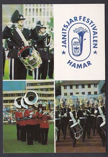 Collage av logo og bilder fra Janitsjarfestivalen på Hamar.